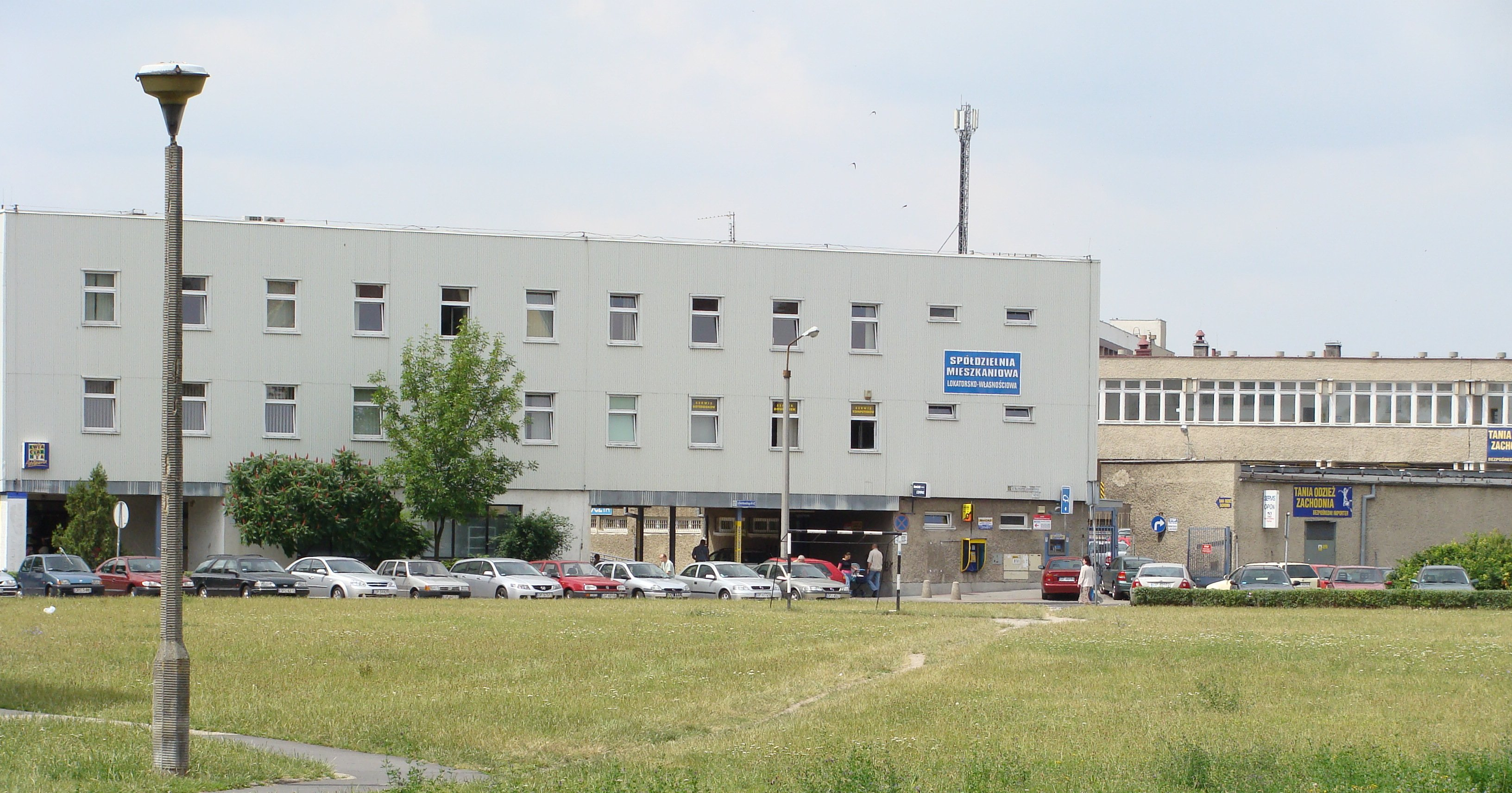 Opole Osiedle ZWM